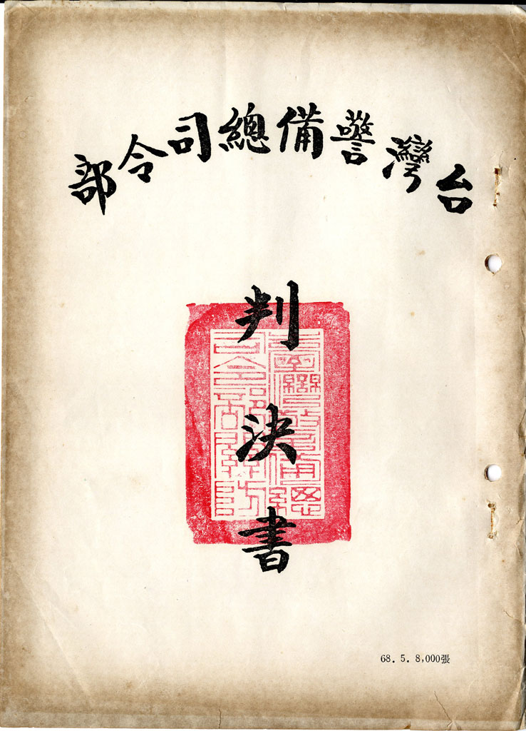 臺灣警備總司令部判決書封面1979年（中華民國68年）5月版，中央蓋印臺灣警備總司令部關防。